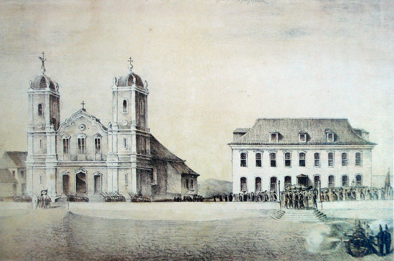 Herrmann Wendroth: Porto Alegre em 1852: Praça da Matriz em dia de procissão, com a antiga Matriz e o primeiro palácio do governo ao lado. Aquarela.